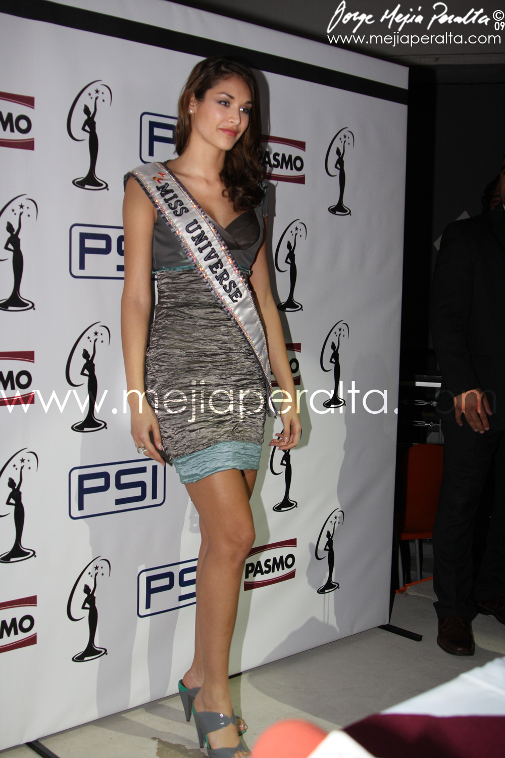 Miss Universe 2009 Dayana Mendoza en Managua, Nicaragua, apoyando la campaña de PASMO "Y vos, como te cuidás del SIDA"